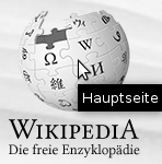 Tooltip beim Mouseover des Logos auf , erstellt mit Firefox 3.6 unter Ubuntu 10.04